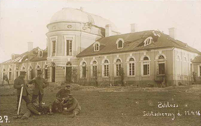 Беларуская (тарашкевіца): Шчорсы (Ščorsy), сядзіба Храптовічаў (Chraptovič)